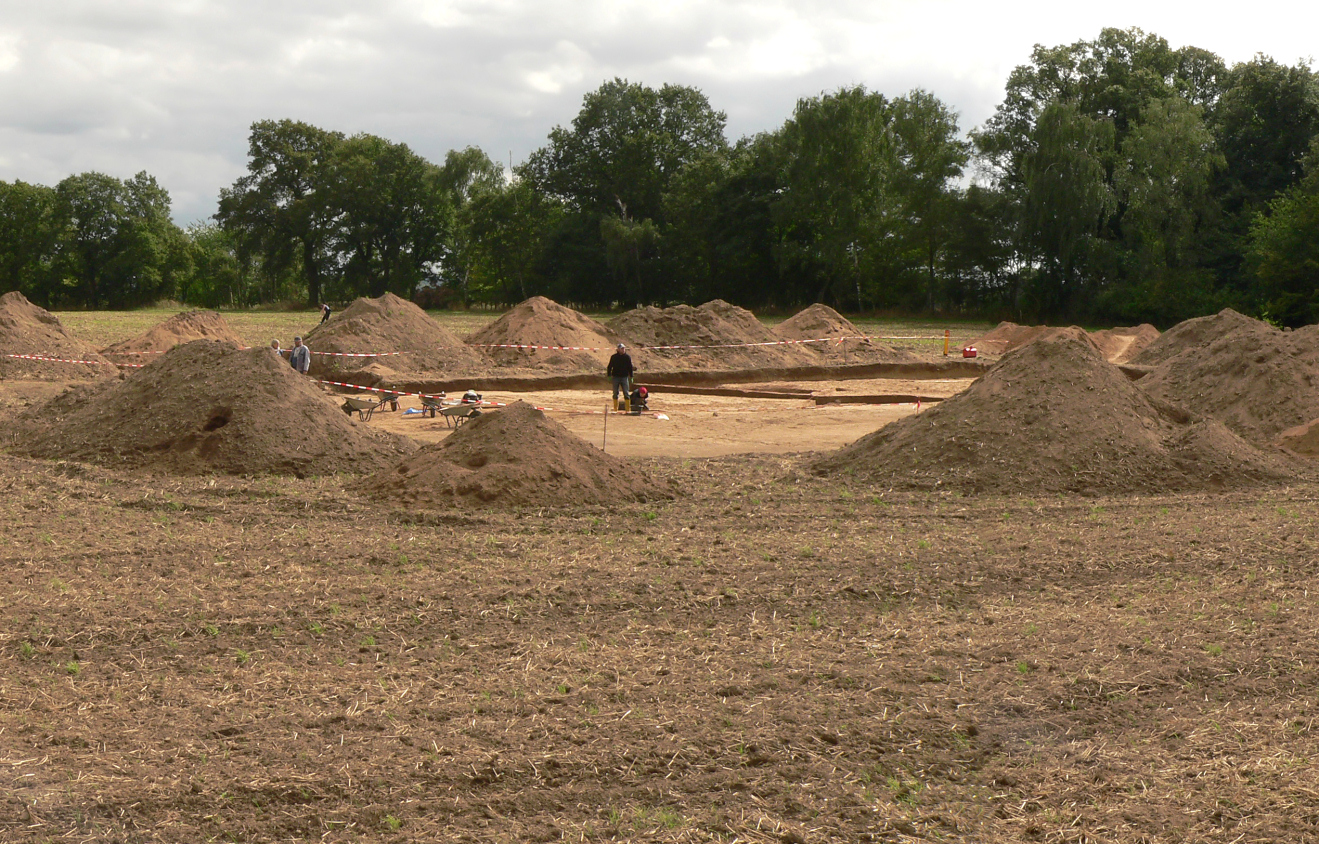 Ausgrabungsarbeiten am Erdwerk von Müsleringen, von der B 215 gesehen